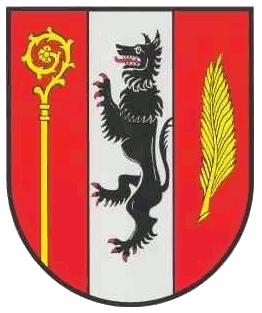 Wappen Gemeinde Faid